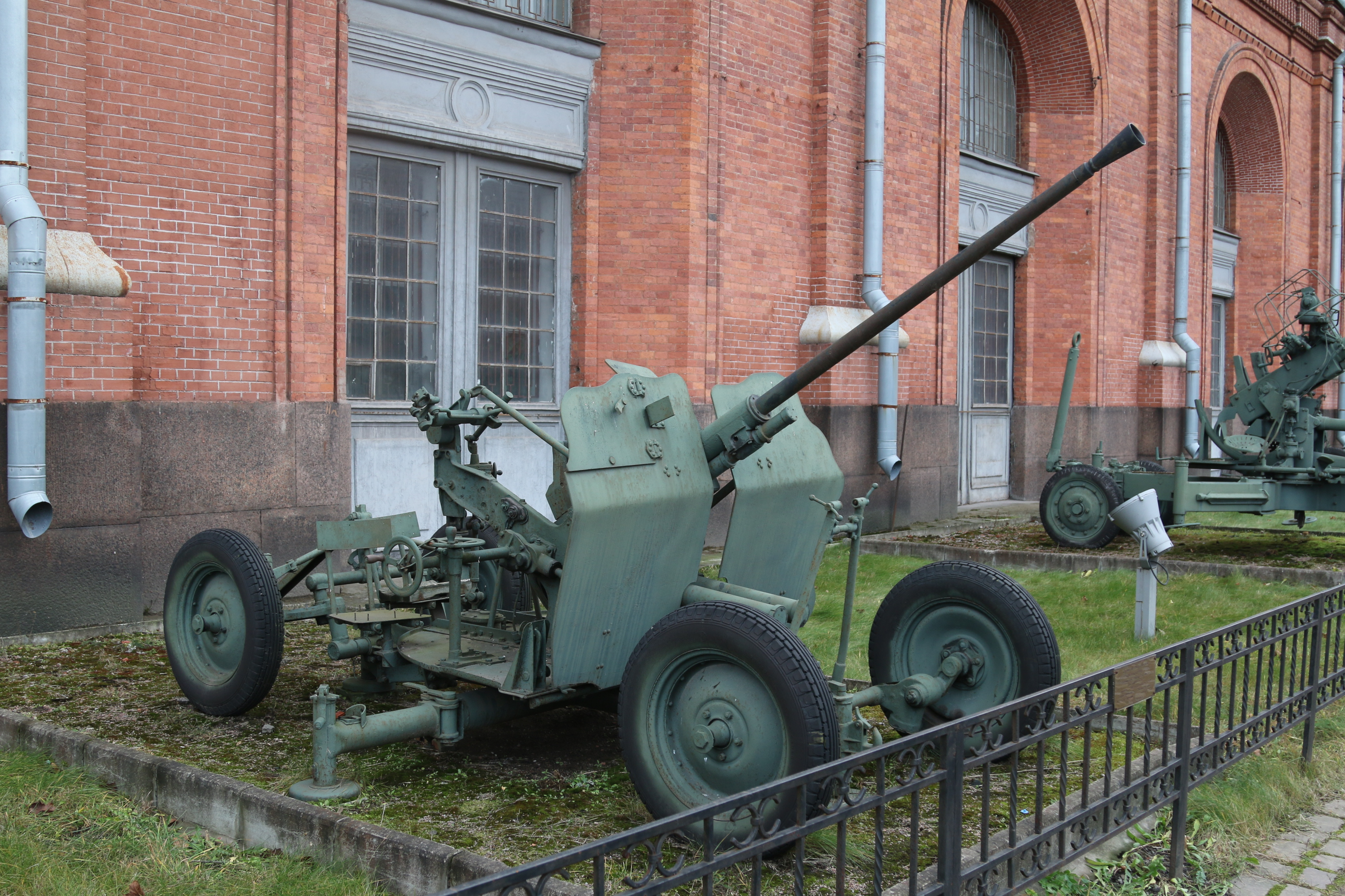 25 мм автоматическая зенитная пушка обр. 1940 года. Главный конструктор Л.А. Локтев.